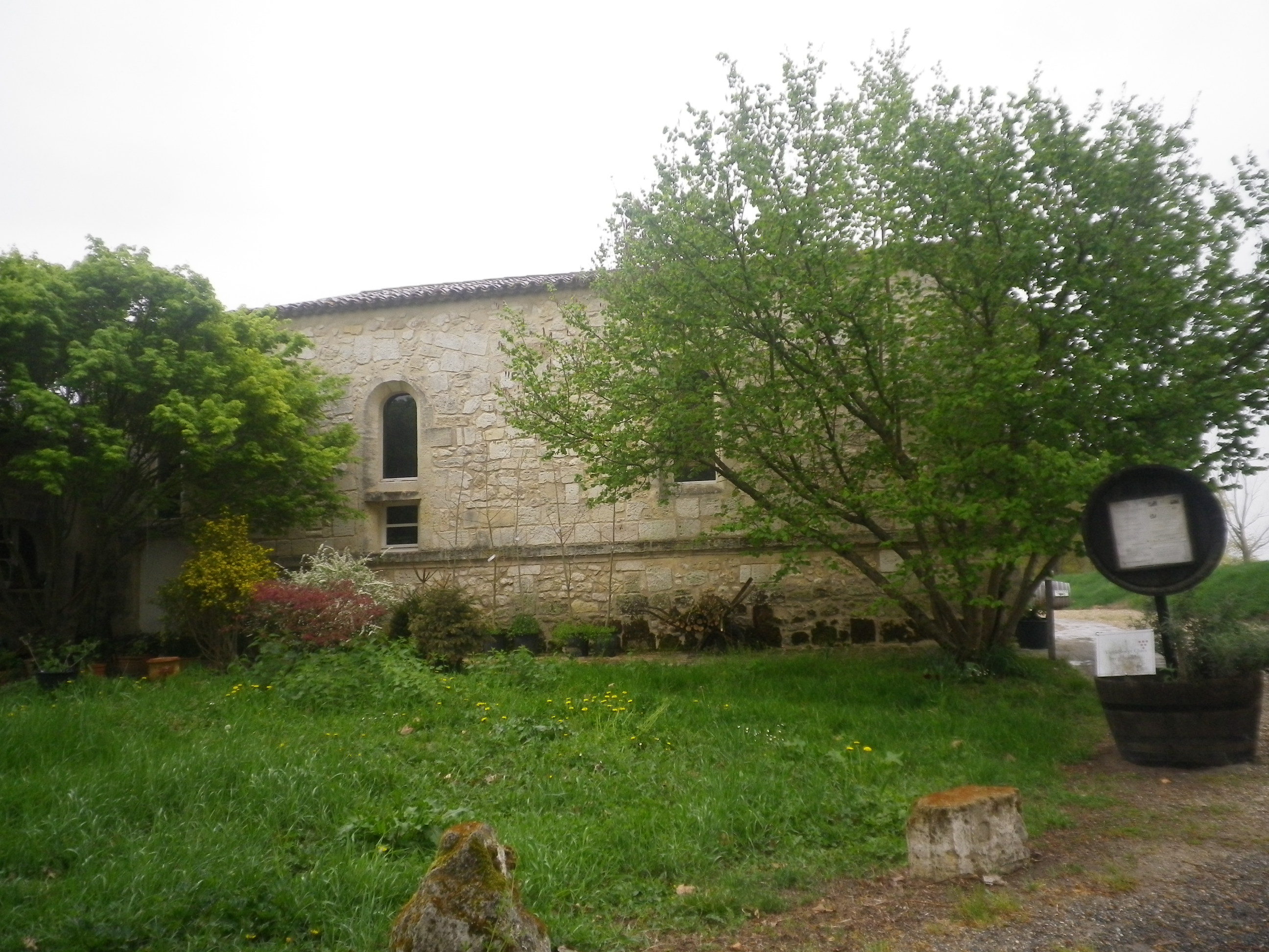 Ancienne église de l'Ile du Carney, dite "la Vieille Chapelle". Commune de Lugon-et-l'Ile-du-Carney (33).